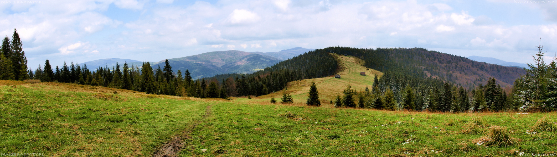 Podskały – polana na grzbiecie górskim pomiędzy Gorcem Troszackim i Jaworzynką w Gorcach